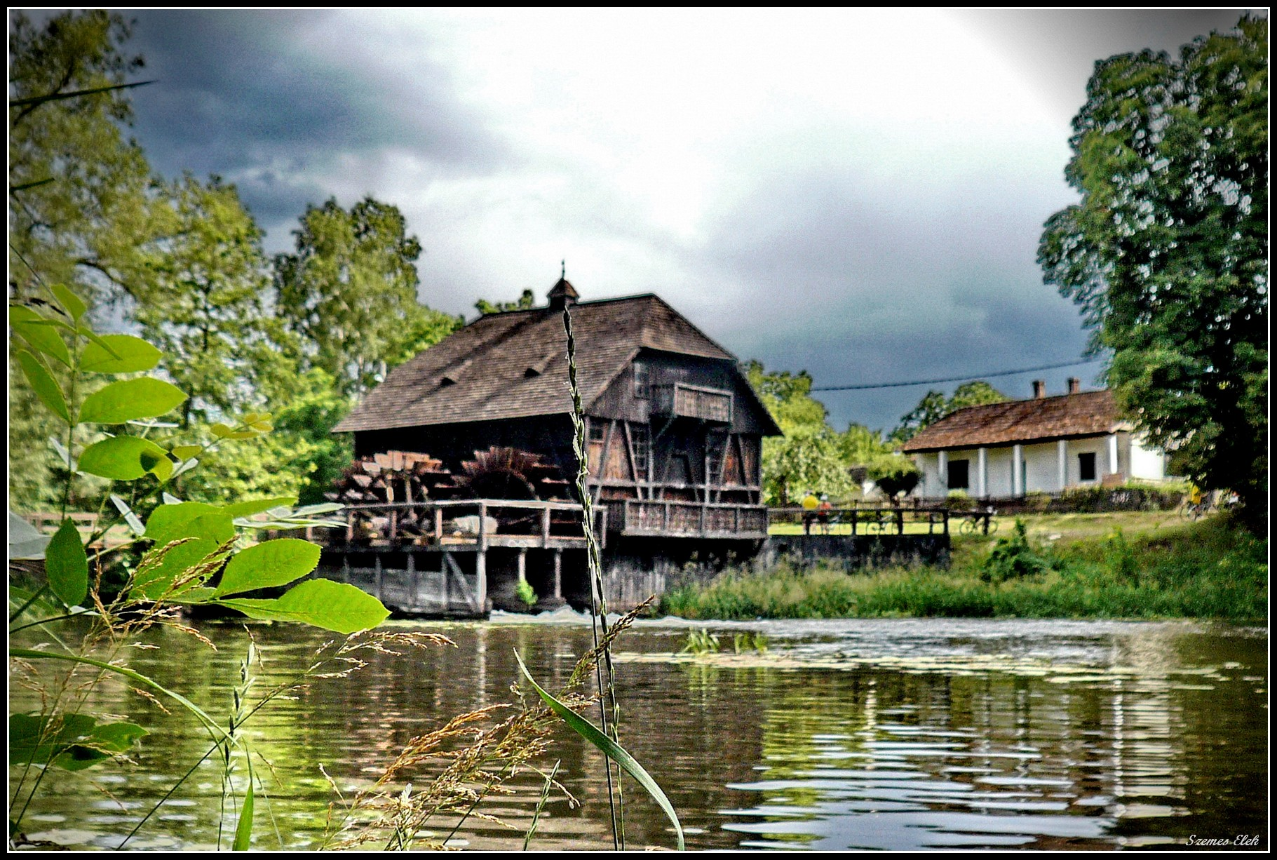 Túristvándi, 4944 Hungary